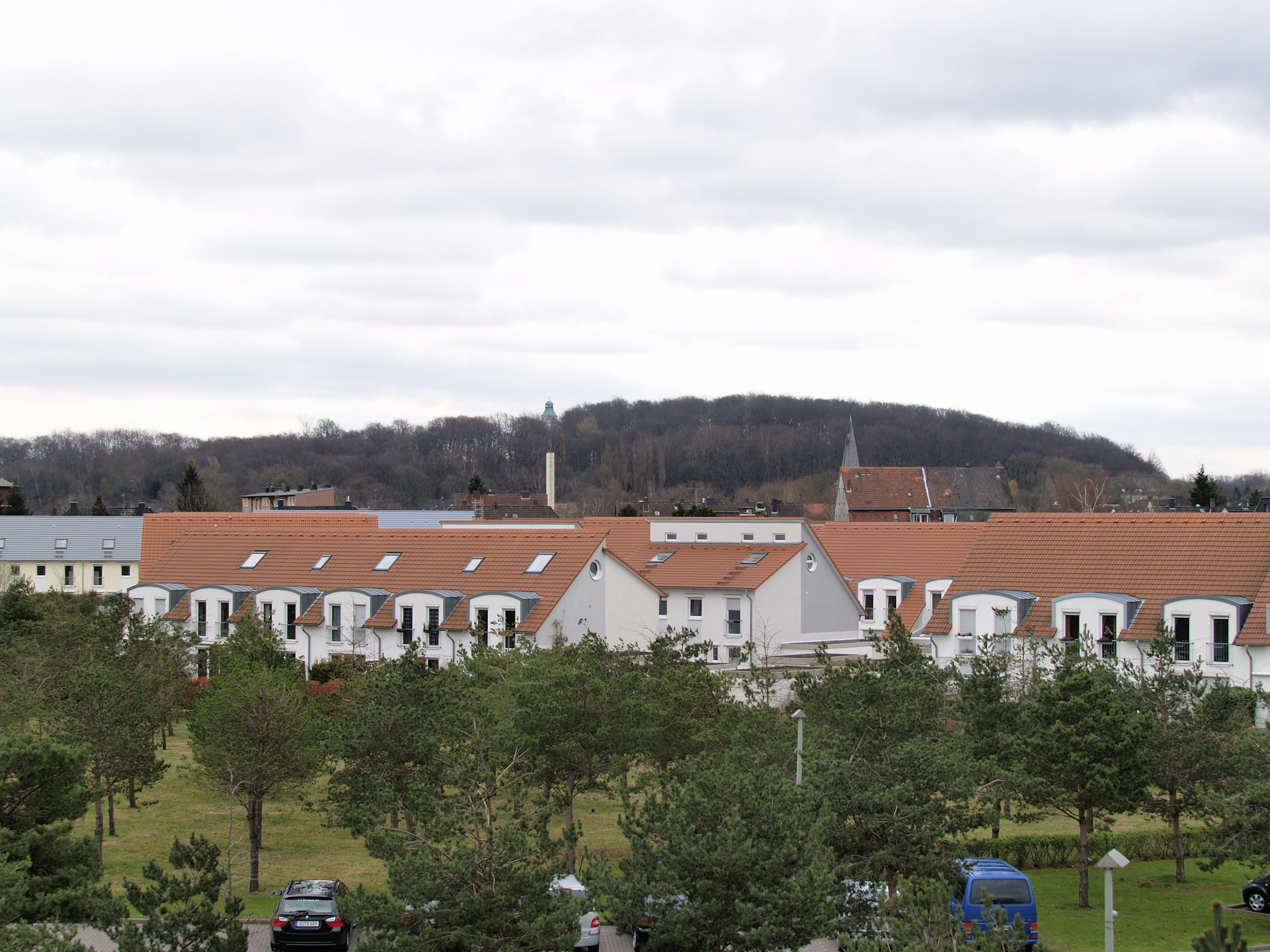 Der Beimberg in Herne-Sodingen mit dem Wilhelmsturm